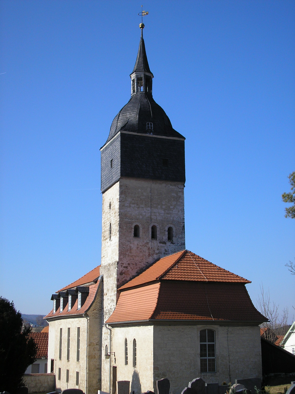 Die Kirche von Niederwillingen (Thüringen).